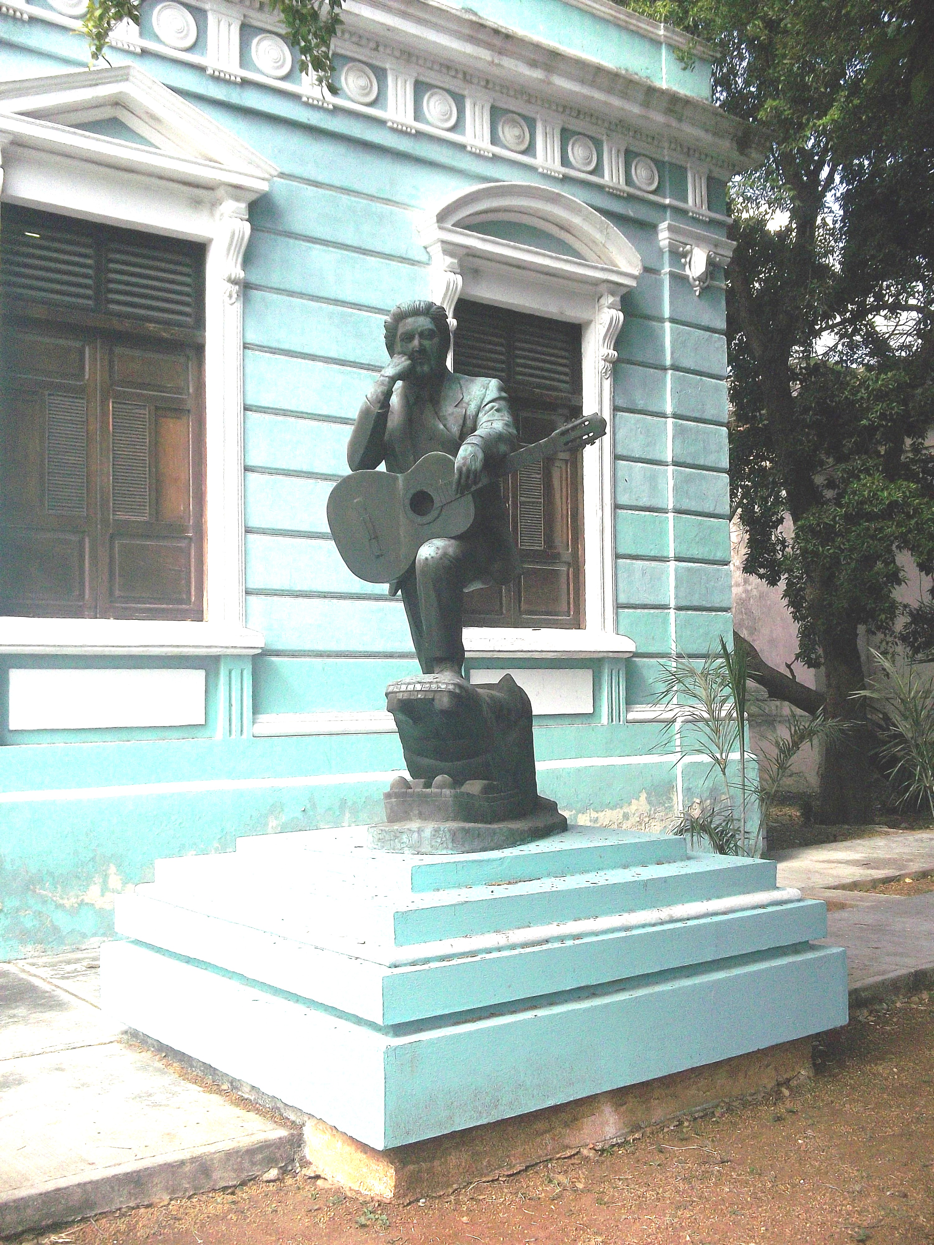 Estatua de Ricardo Palmerín en Mérida, Yucatán.